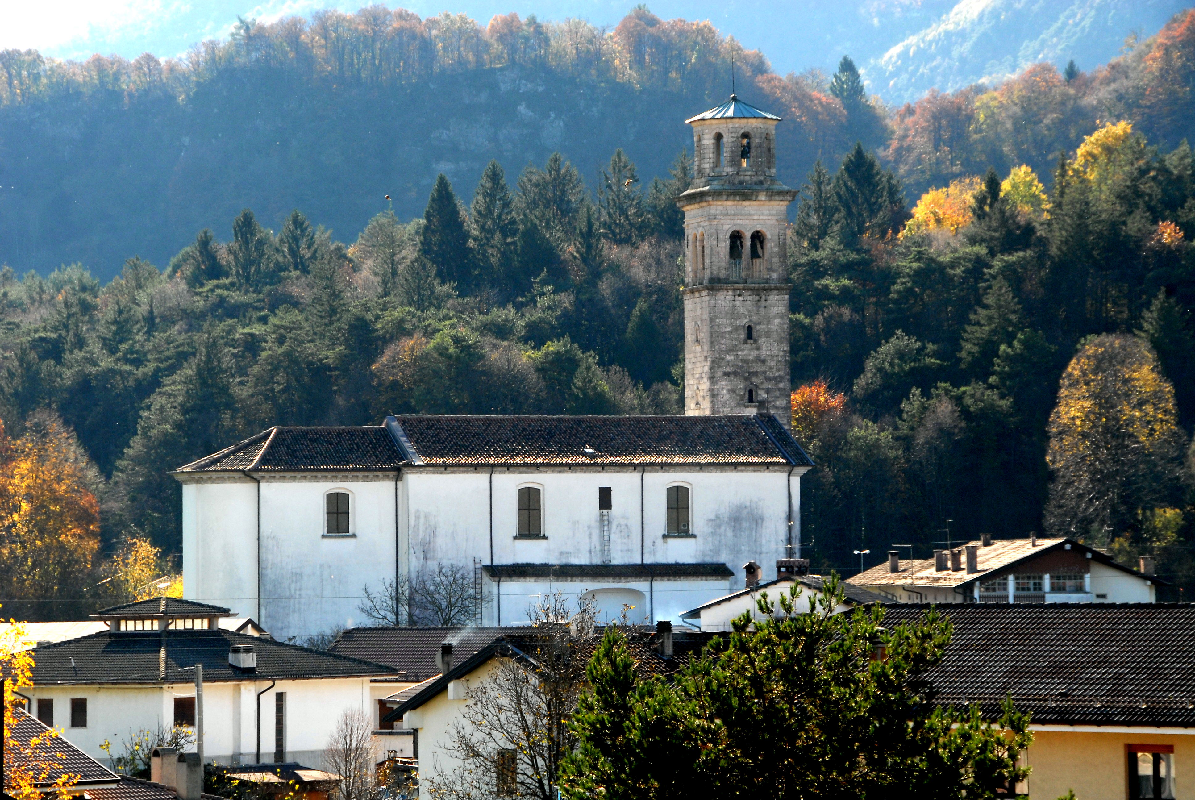 Church of Saint Daniel at Cavazzo Càrnico, province of Udine, region Friuli Venezia-Giulia, Italy